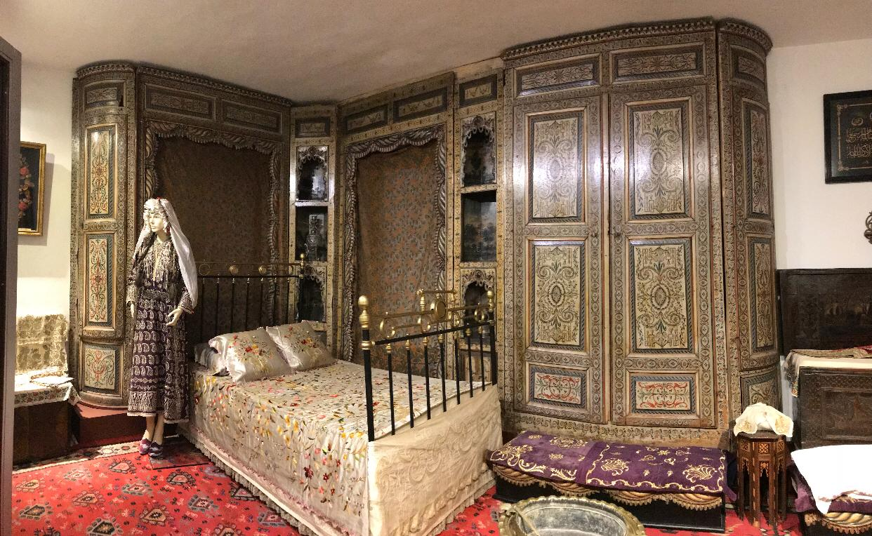 A 19th century Edirnekari room from Edirne Museum